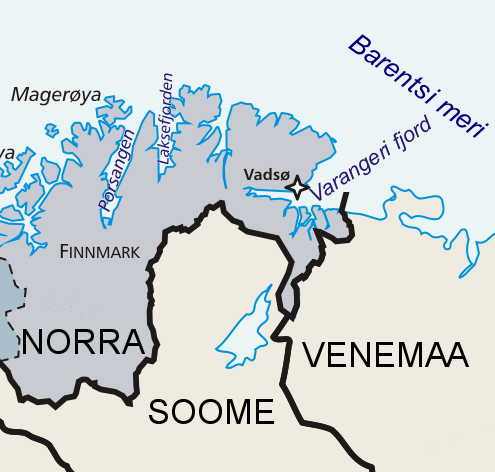 Norra kaart